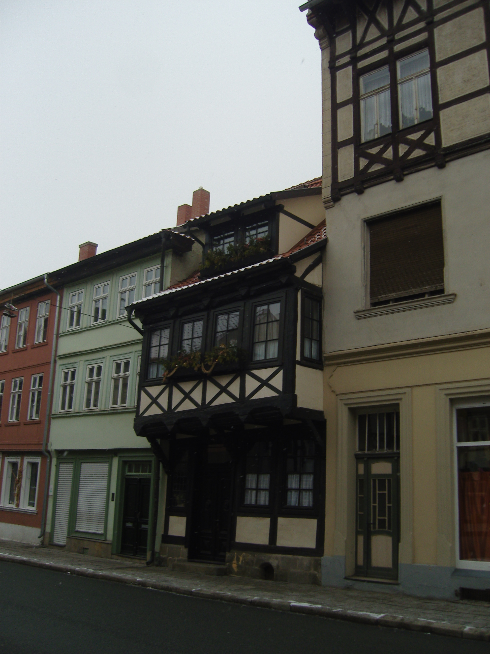 Denkmalgeschütztes Fachwerkwohnhaus im Neuen Weg 47 in Quedlinburg